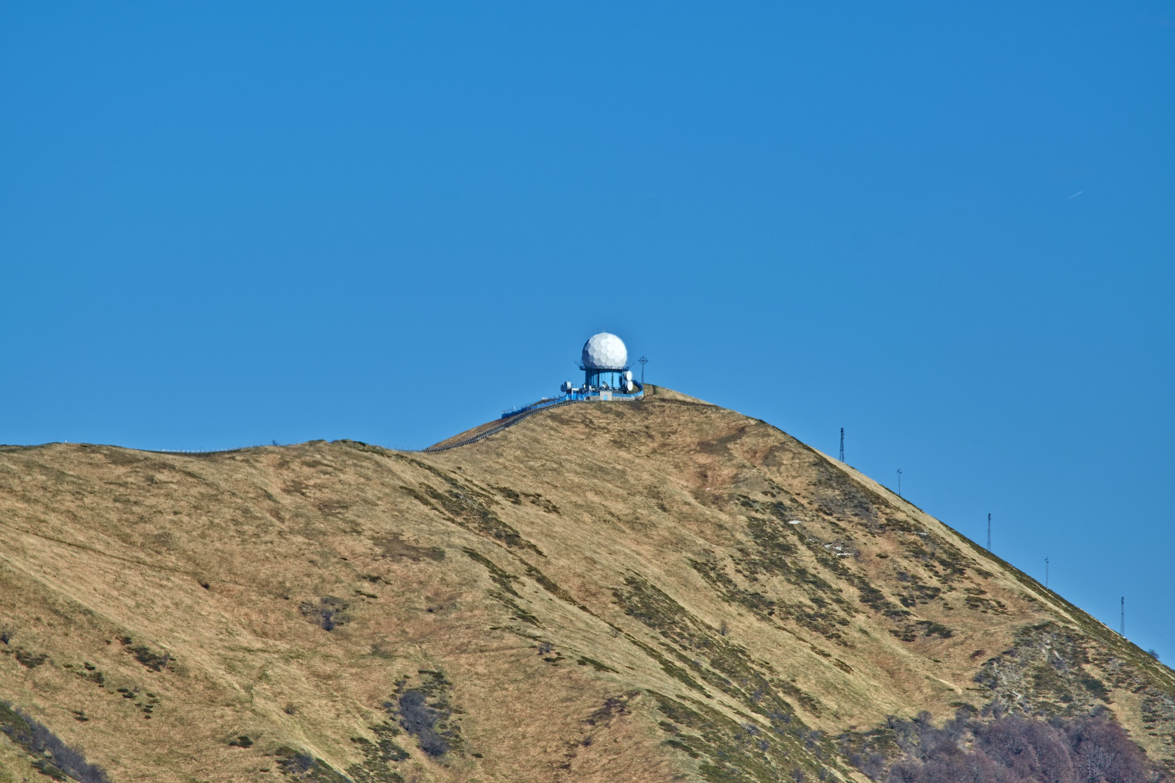 Radar del Lesima (telefoto)